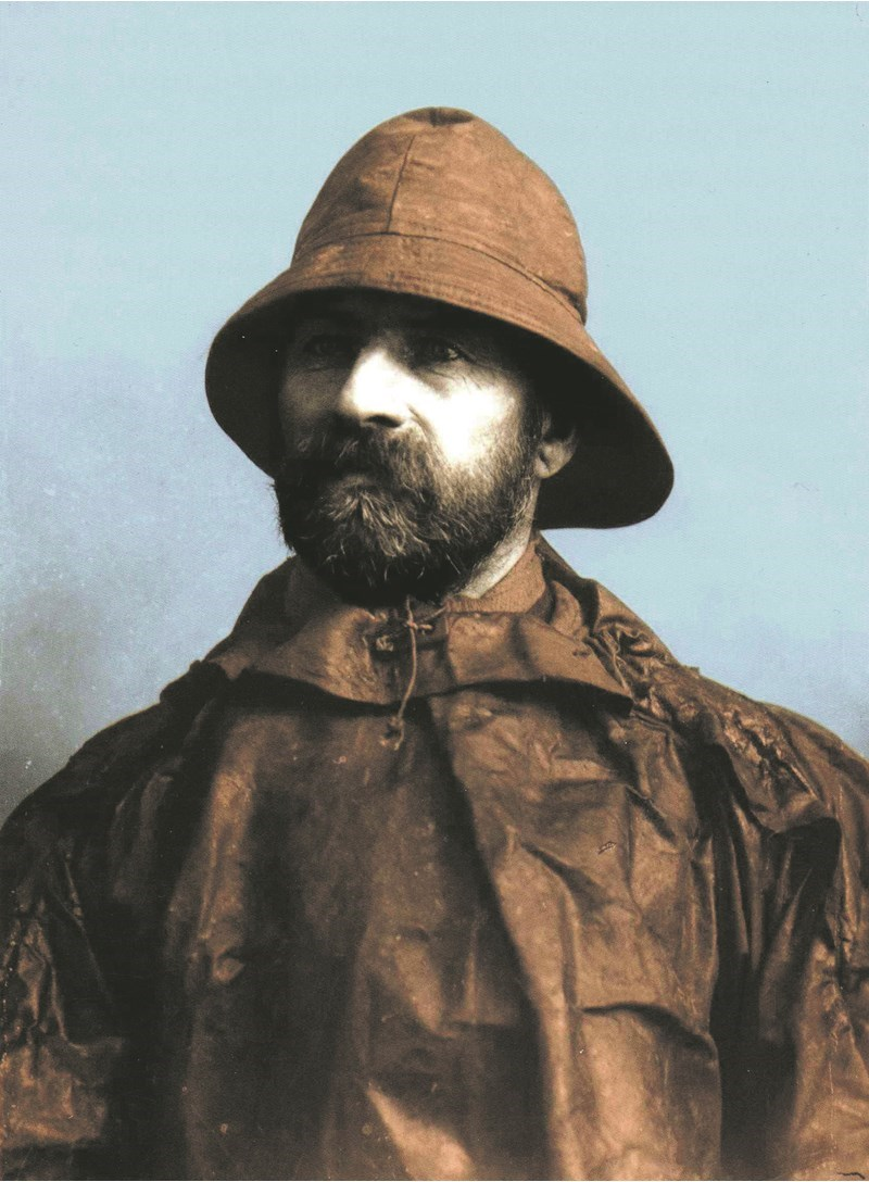 Sjómaður í fatnaði frá Sjóklæðagerð Íslands